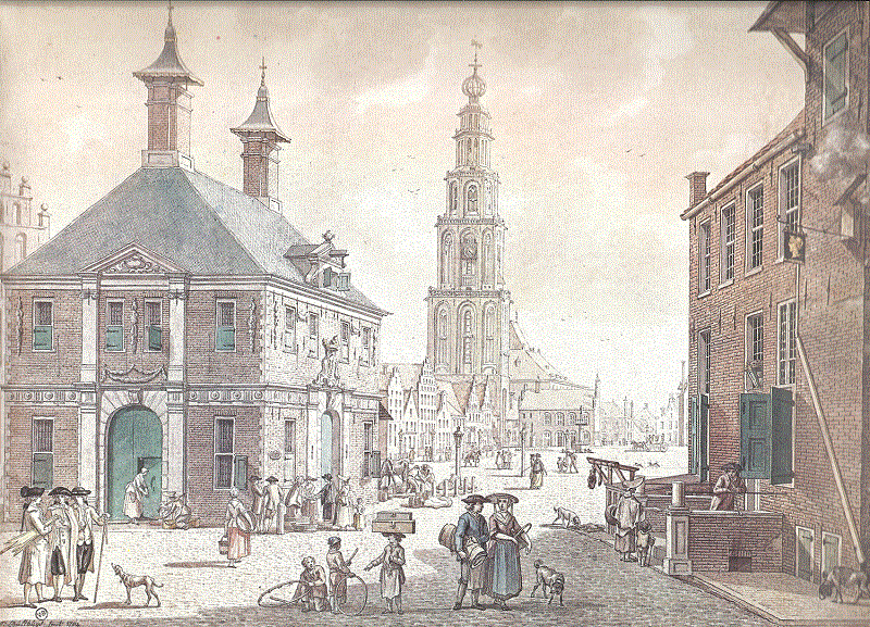 Watercolor painting by J. Bulthuis of the north side of the Grote Markt in Groningen, looking to the east towards the Martini church and tower with on the left hand side the Waag and the left hand side the inn 'het Gouden Hooft' (1782)